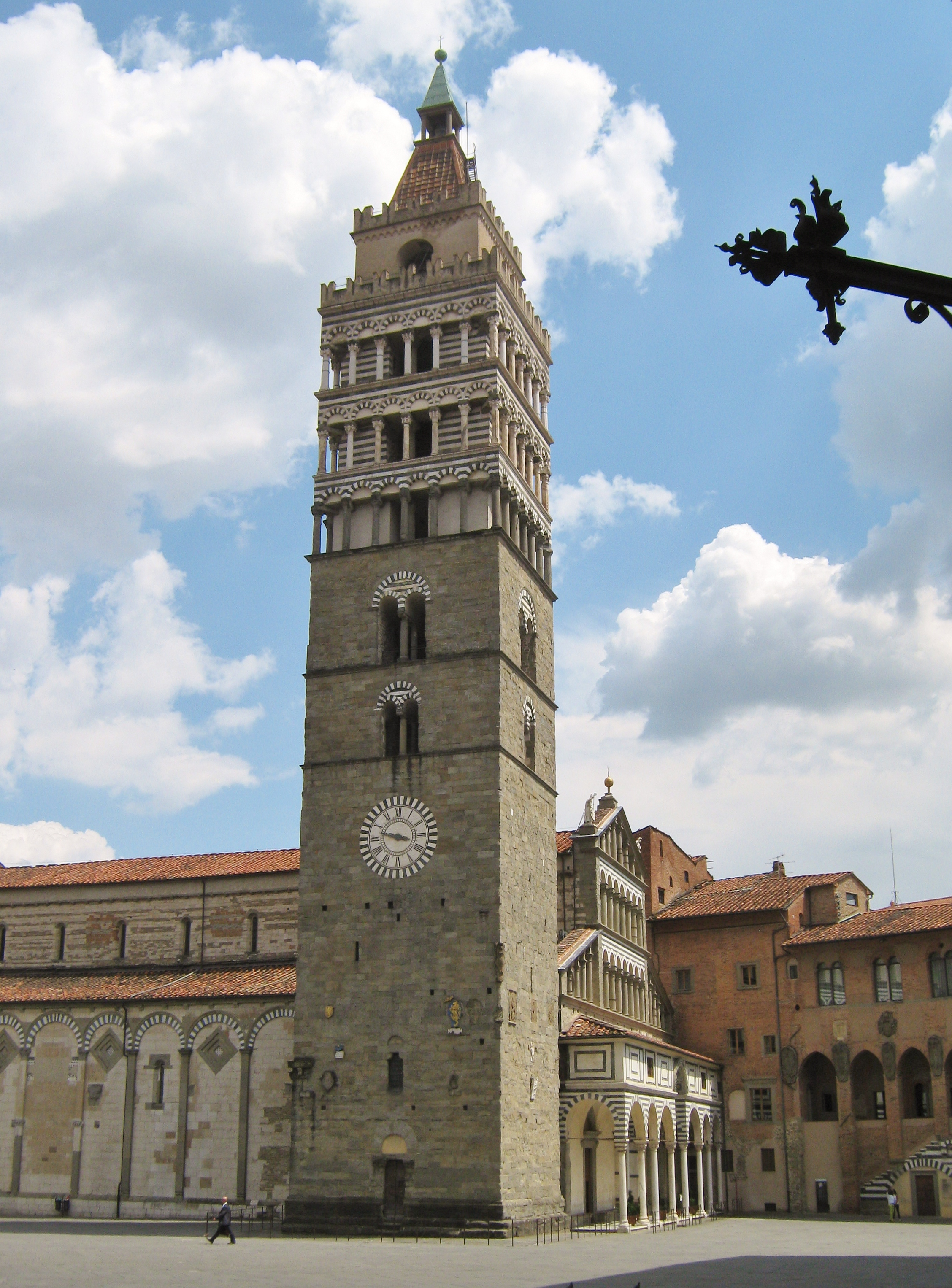 Pistoia: il Duomo e il campanile.